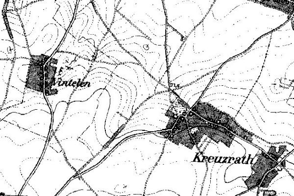 Neuaufnahme 1891-1912